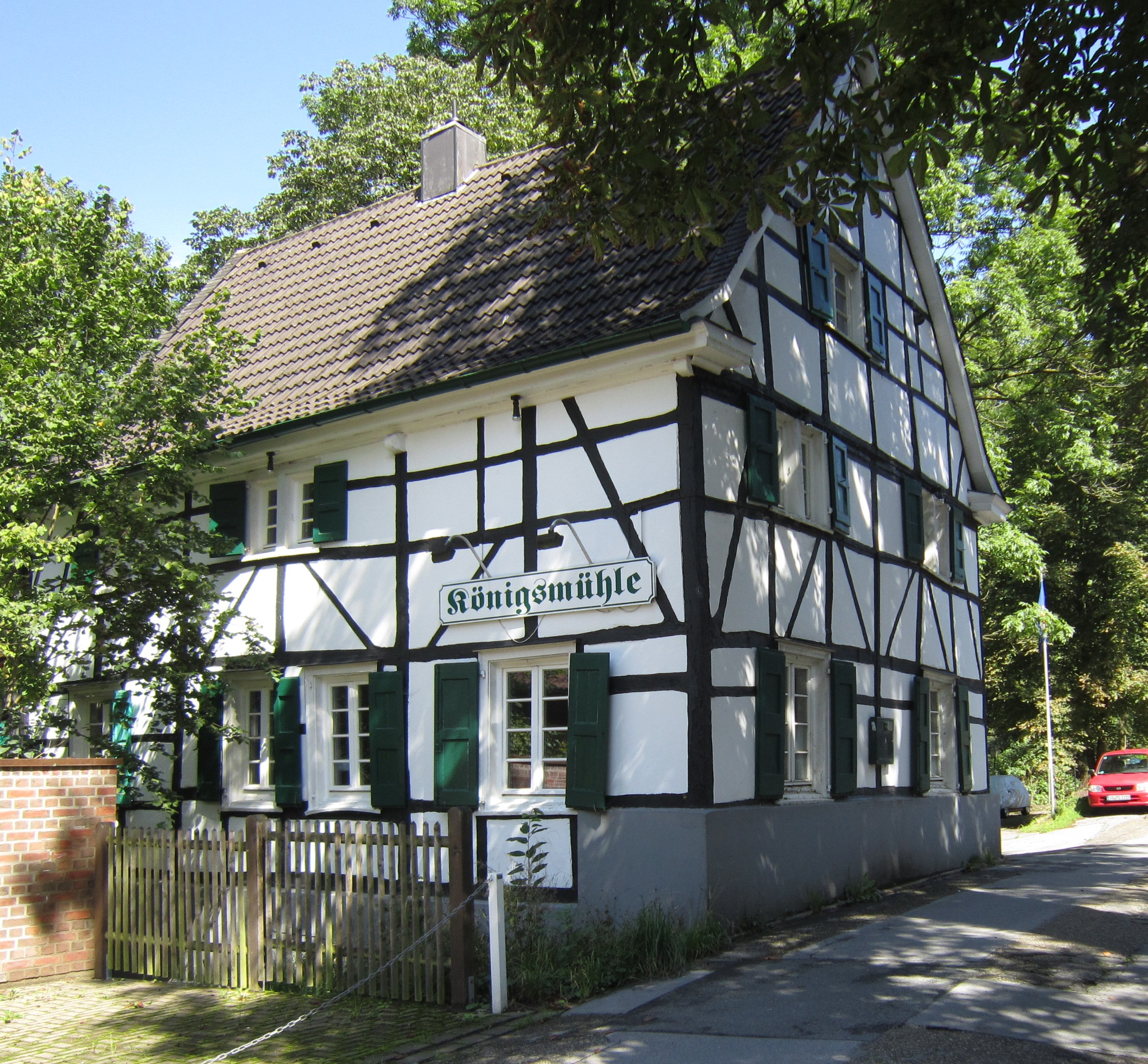 Ehemaliges Mühlengebäude an der Weinsbergtalstraße, aufgenommen im Sommer 2014